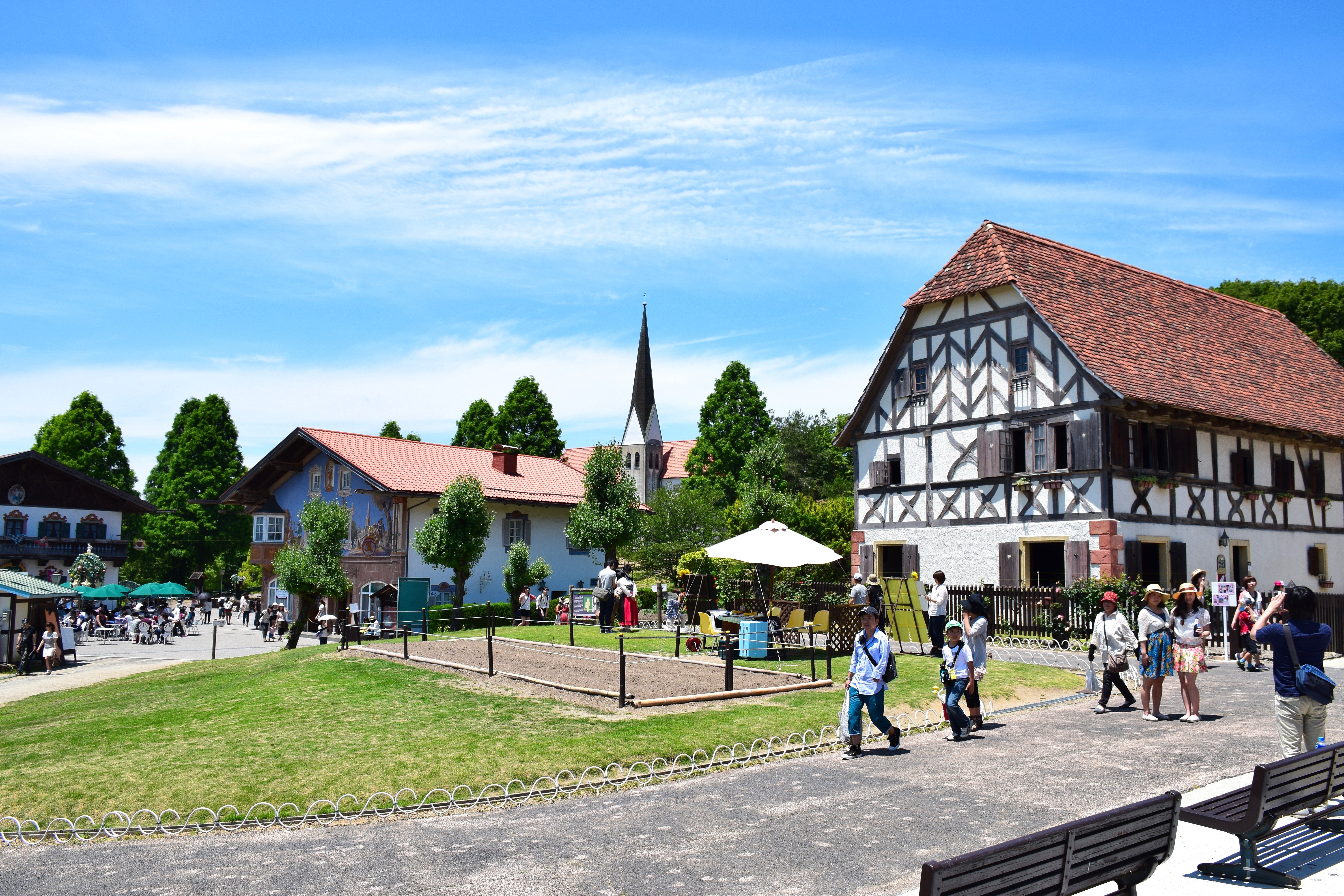 フランス・ドイツの家